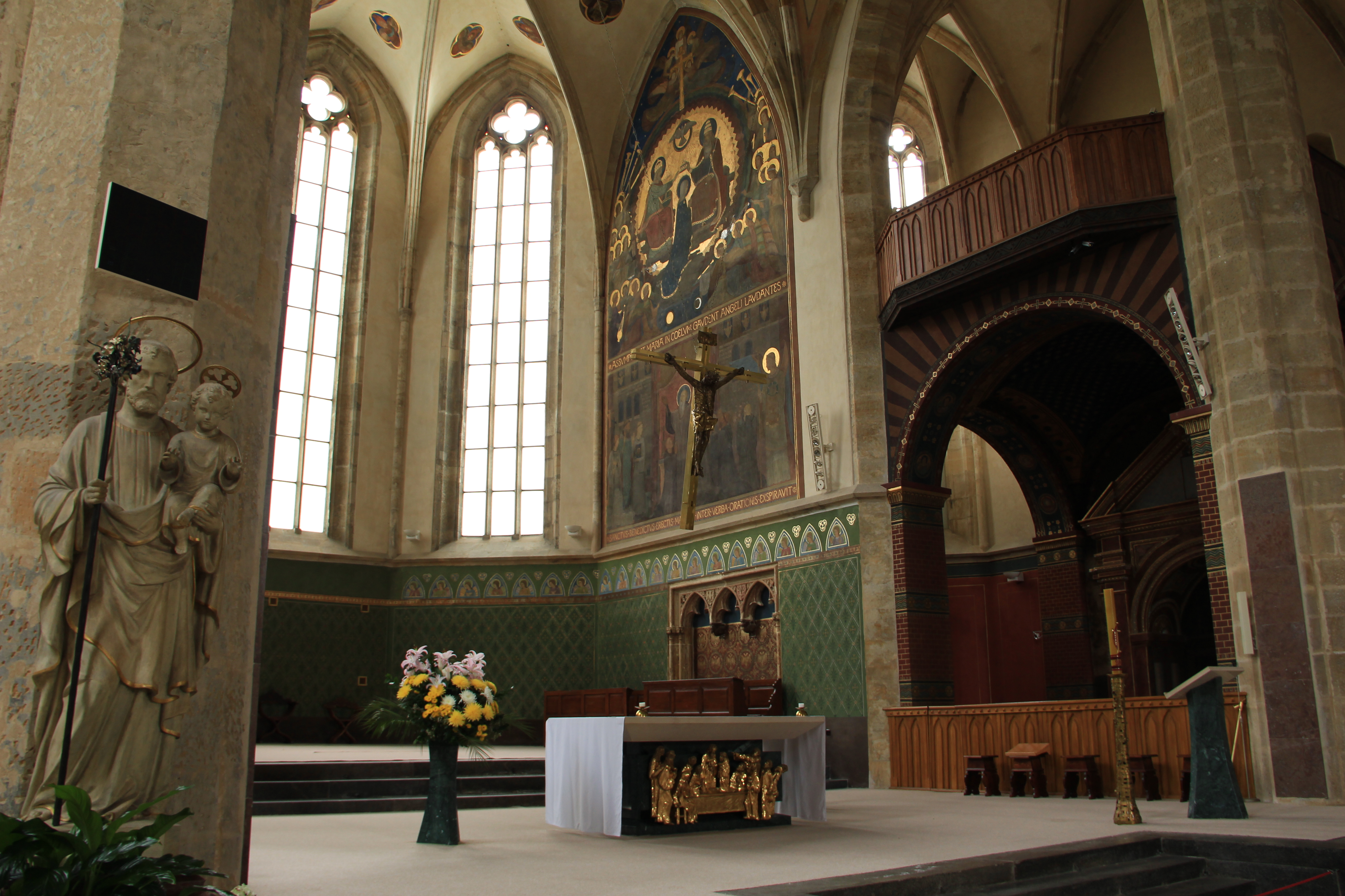 Hlavný oltár